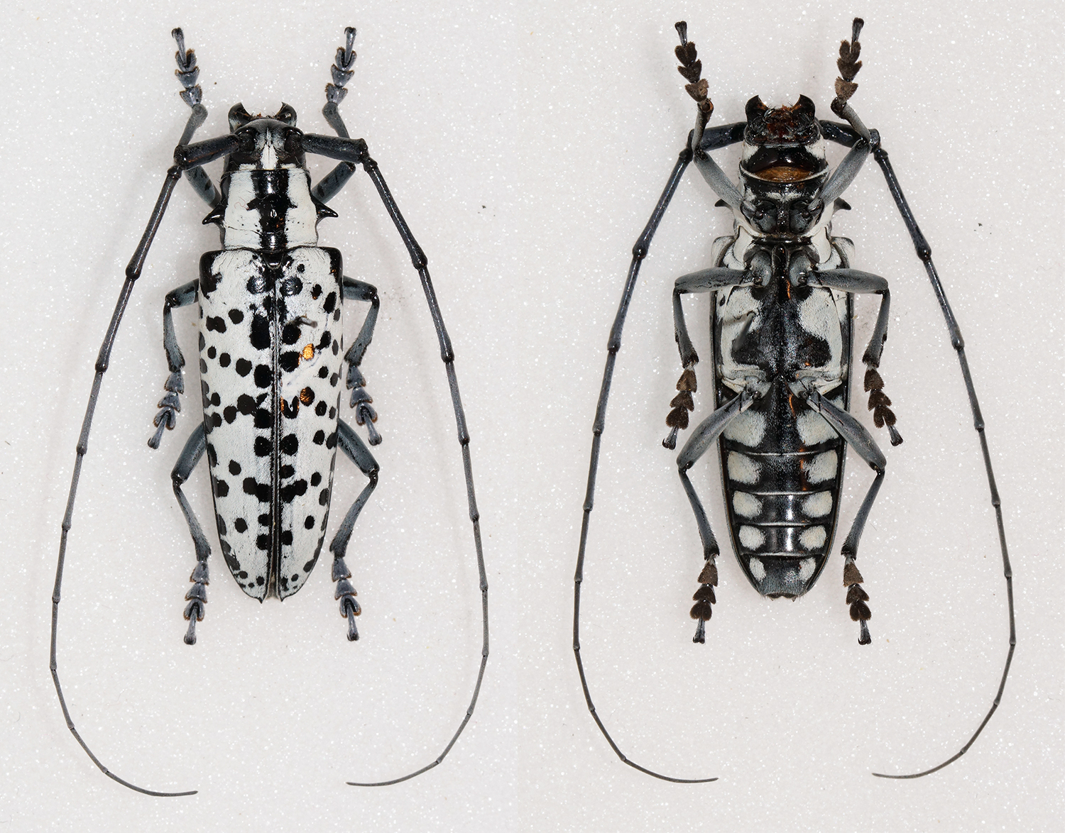 Bates,1869 Sex: Male Data: 04-2012 - Heredia - Sarapiqui - Costa Rica Size: 32.5mm